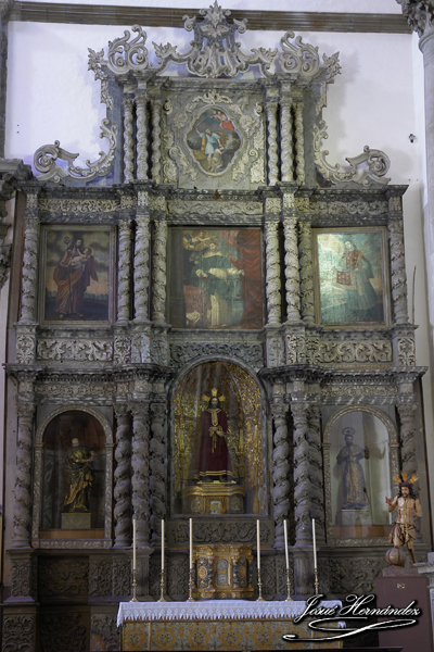 Retablo del Señor Preso, siglo XVII Anónimo Parroquia de Nuestra Señora de la Concepción, Villa de La Orotava (Tenerife)